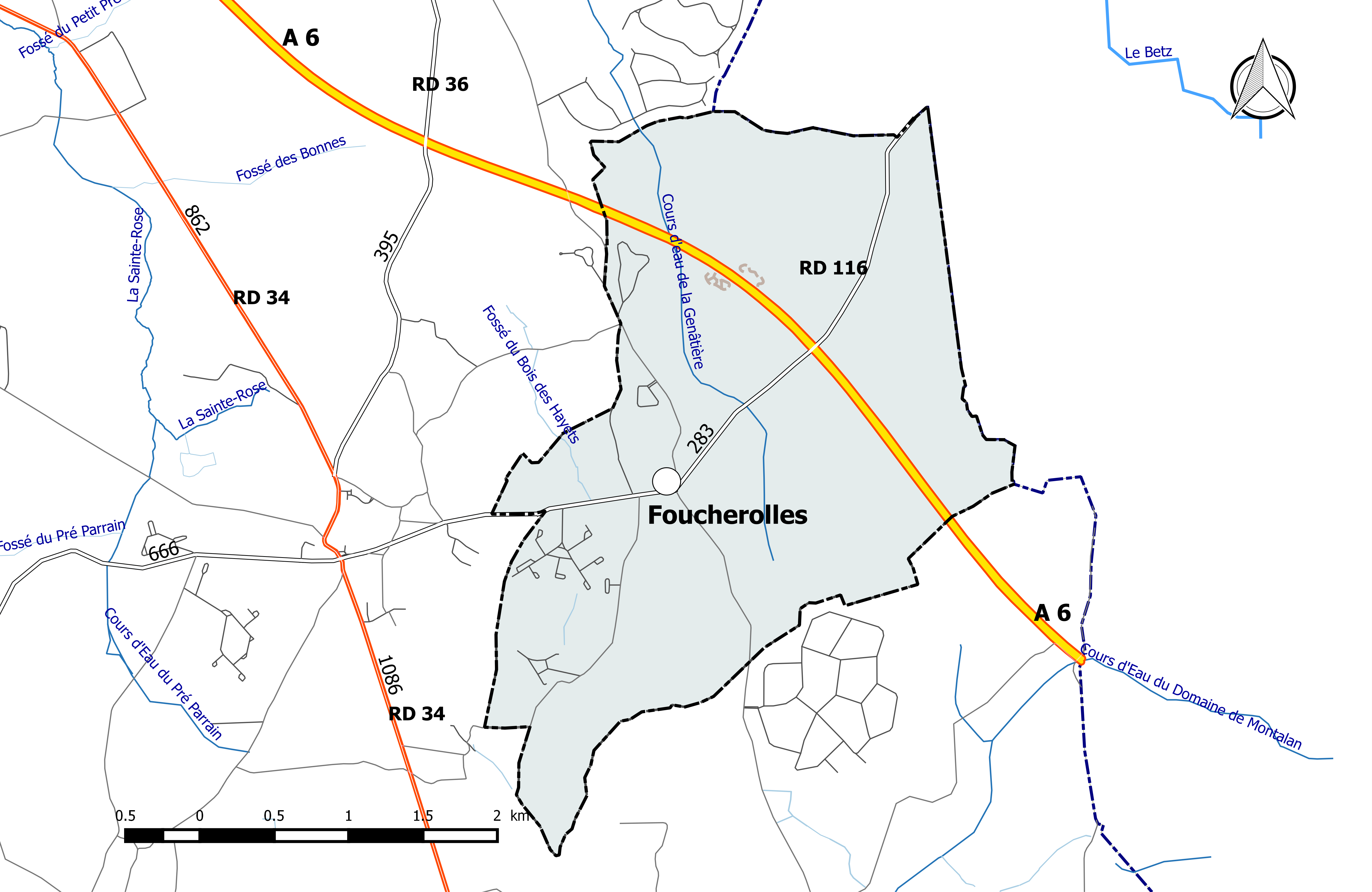 Carte du réseau routier de la commune de Foucherolles (Loiret).